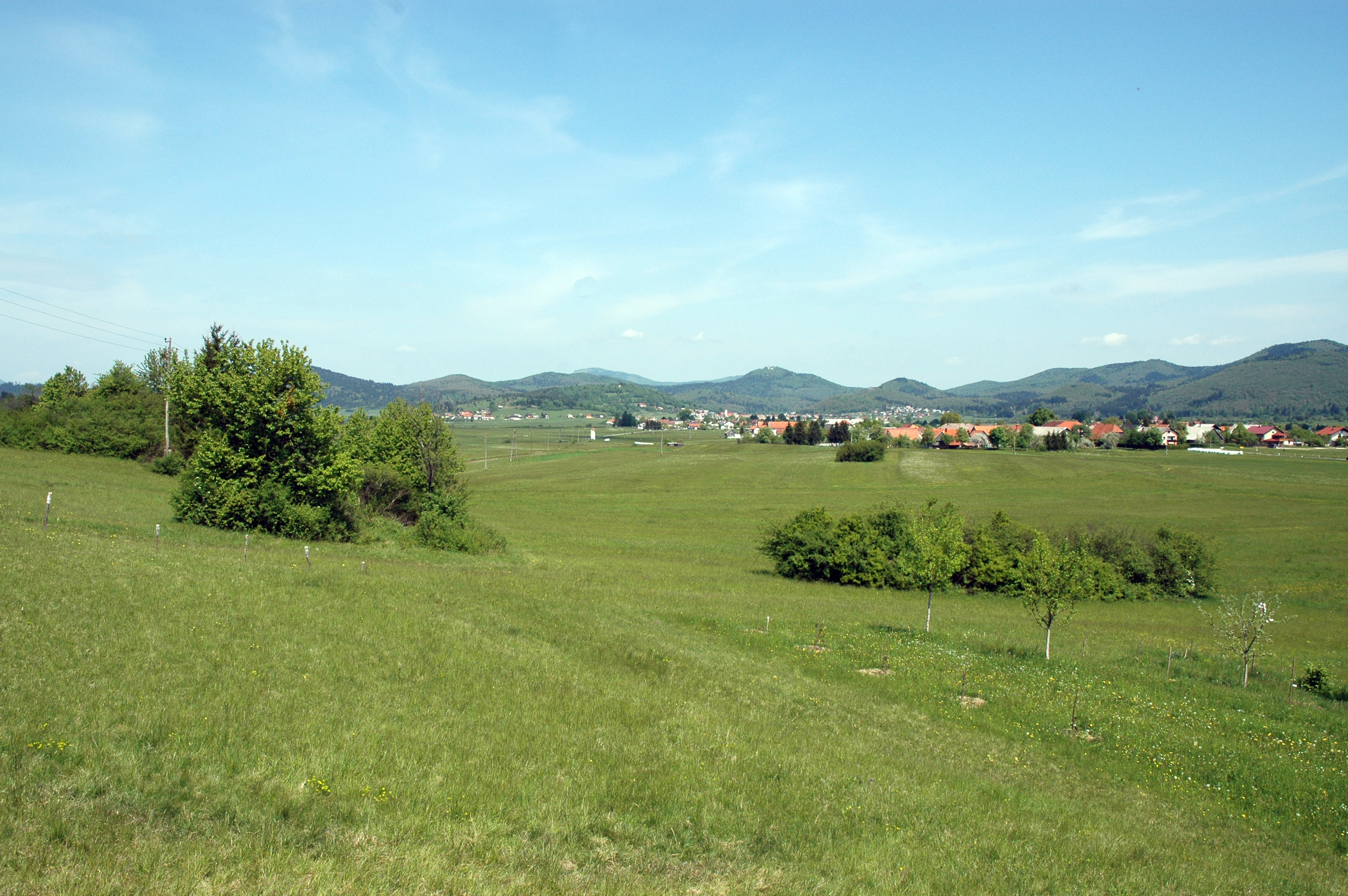 Pogled na Loško dolino